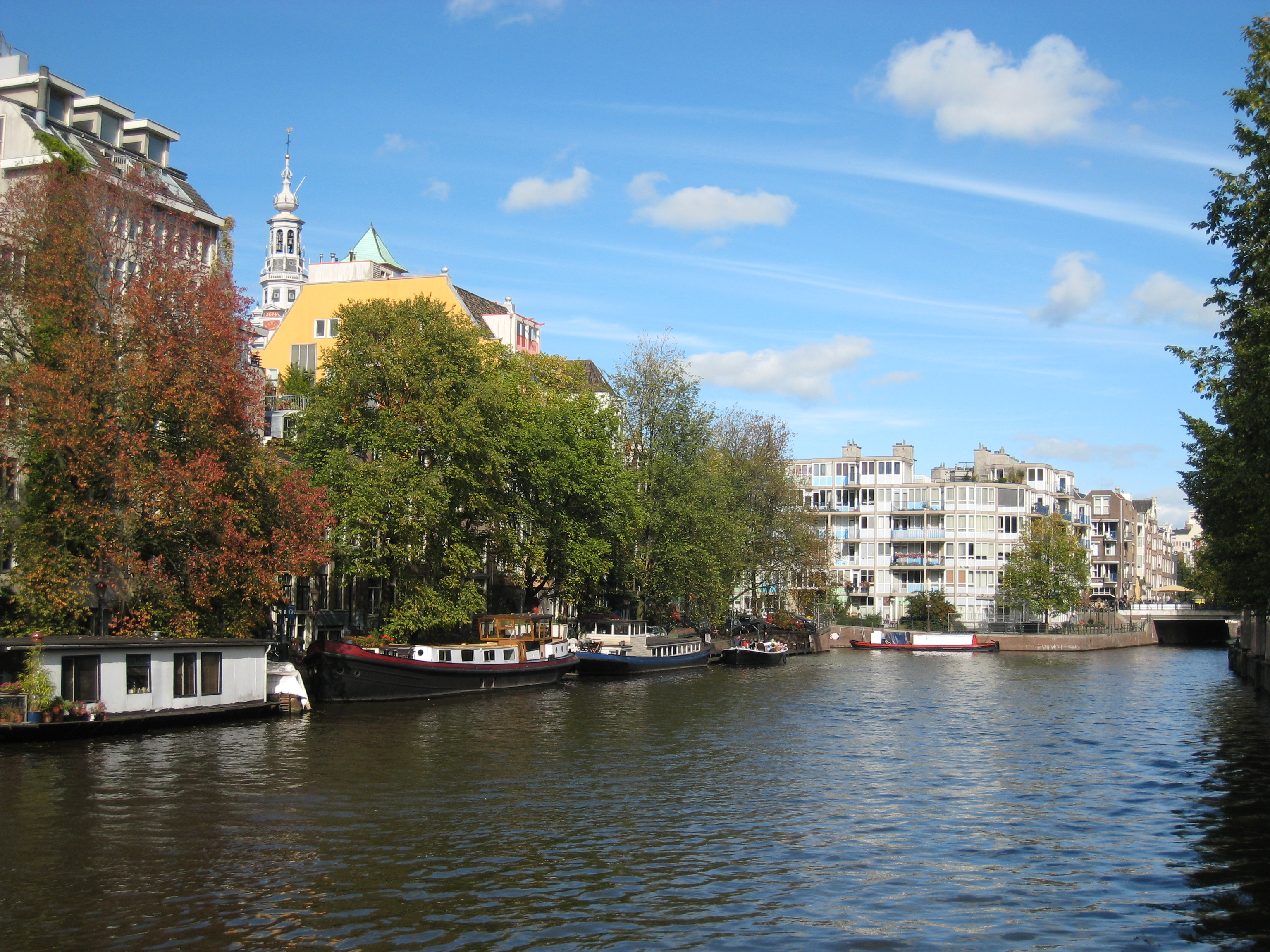 De Zwanenburgwal is een gracht in het centrum van Amsterdam. Foto richting Sint Antoniesluis. en: The Zwanenburgwal is a canal in Amsterdam.